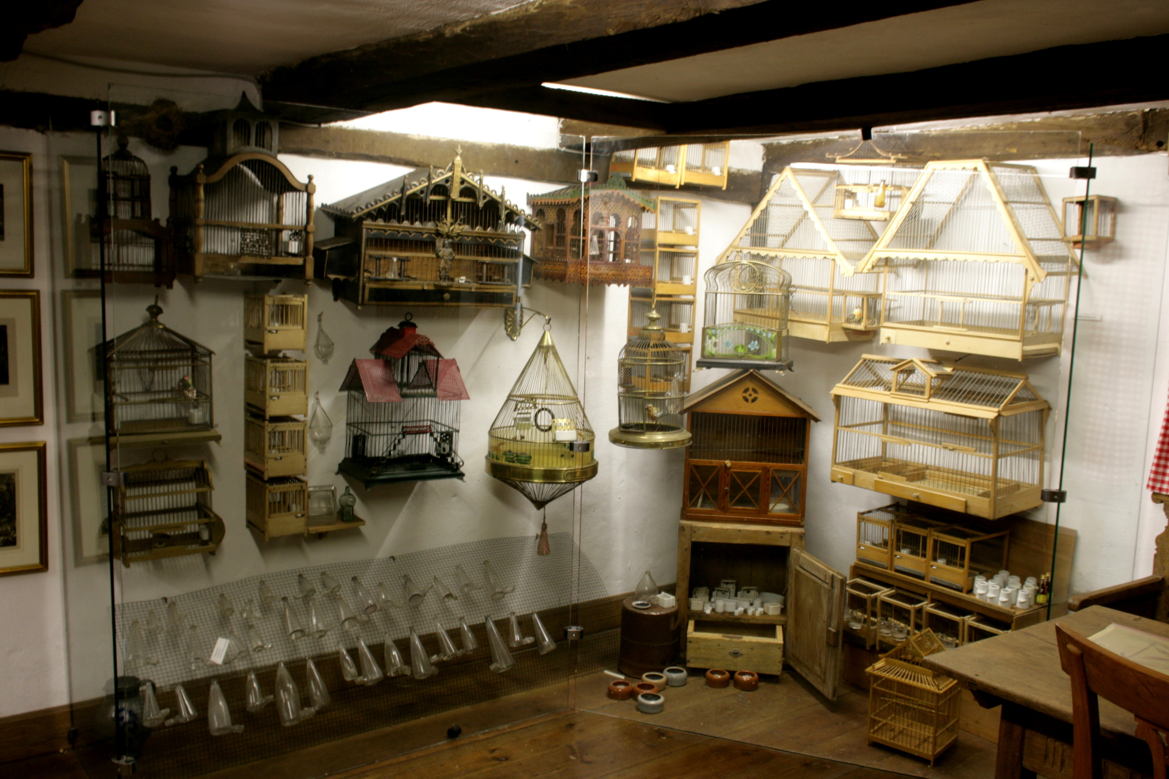 Bauernhausmuseum Hattingen, An der Kemnade 10 in Hattingen-Blankenstein